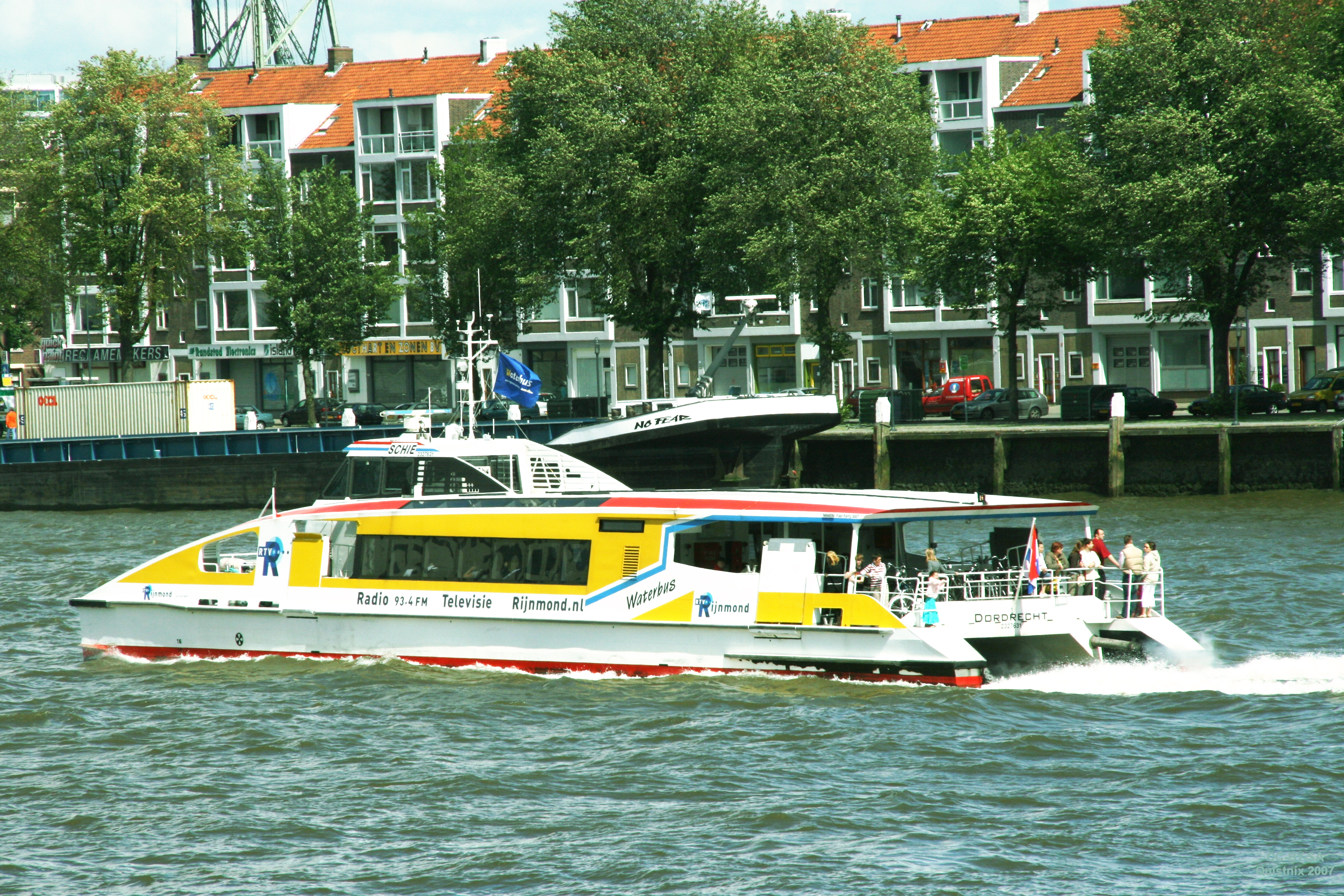 Waterbus Drechtsteden, foto van een waterbus ter hoogte van de Erasmusbrug in Rotterdam